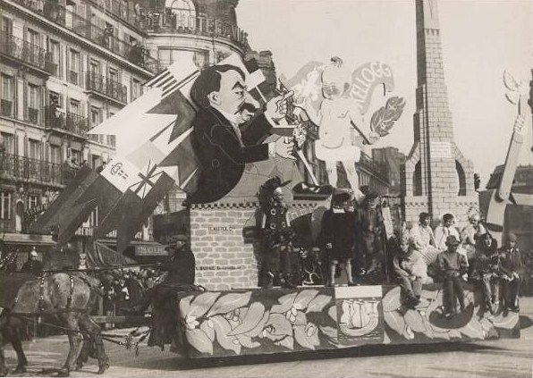 Char de la Mi-Carême 1929 à Paris